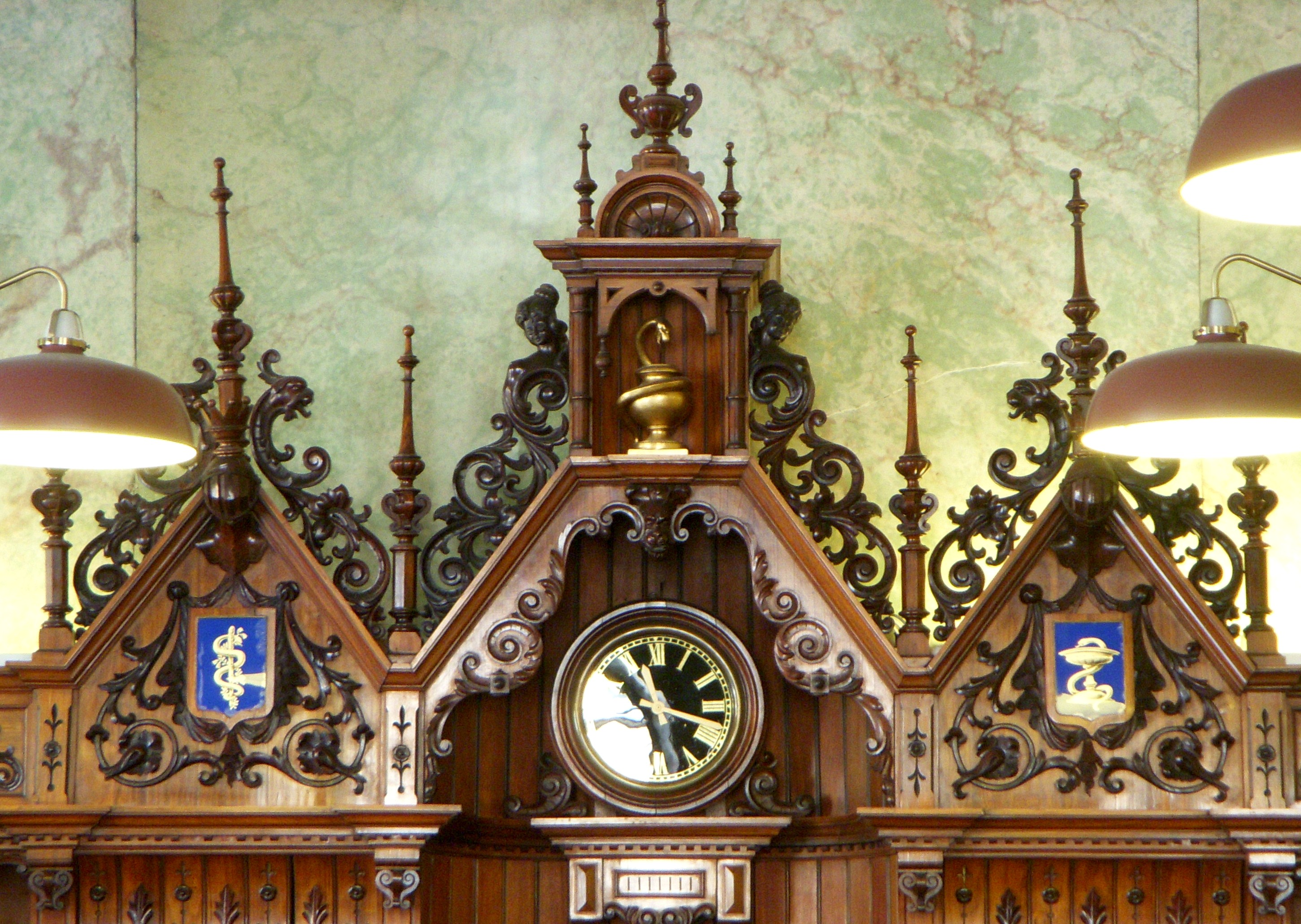 Apoteket Storken på Östermalm, Stockholm